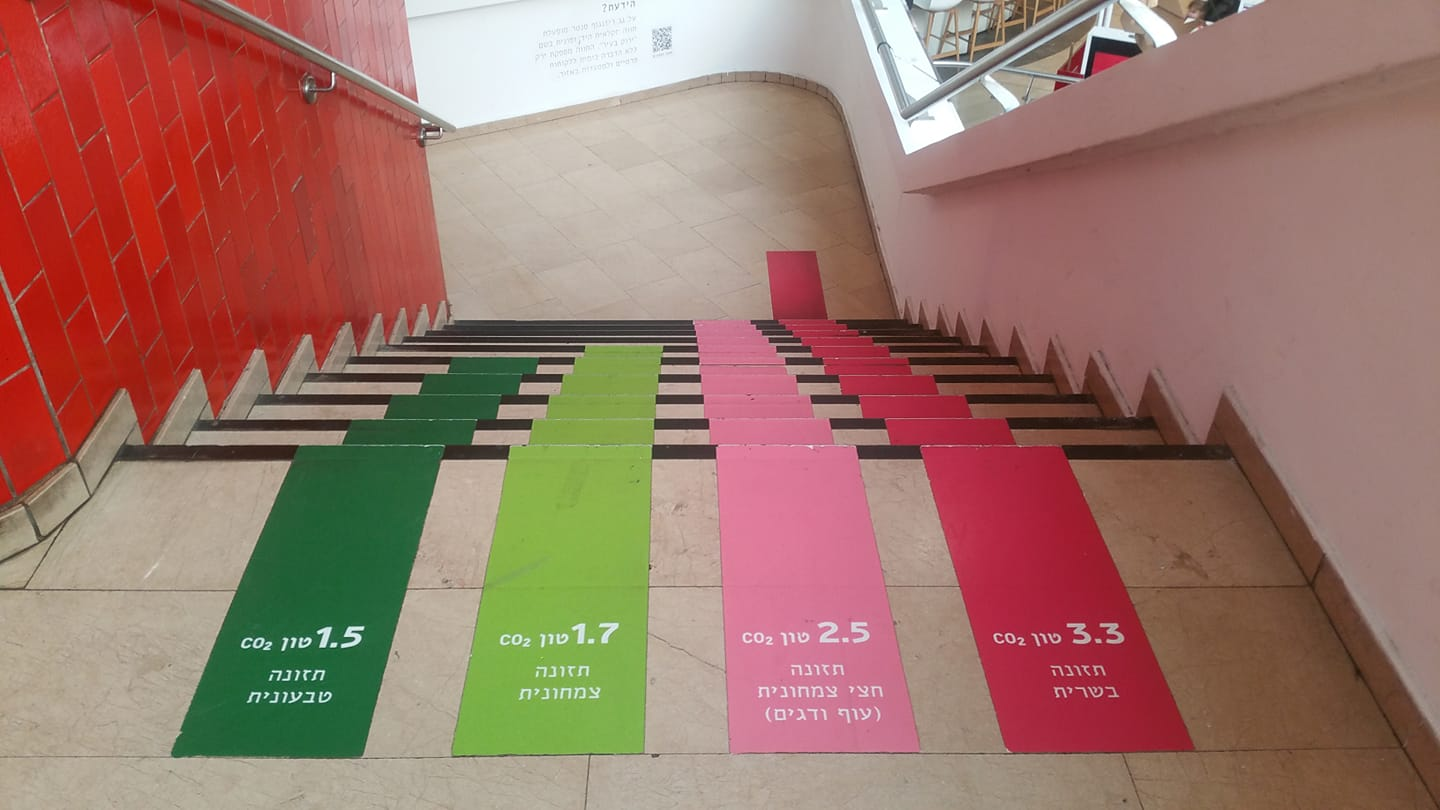 השפעת המזון על הסביבה - דיזנגוף סנטר